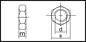 ISO 4035